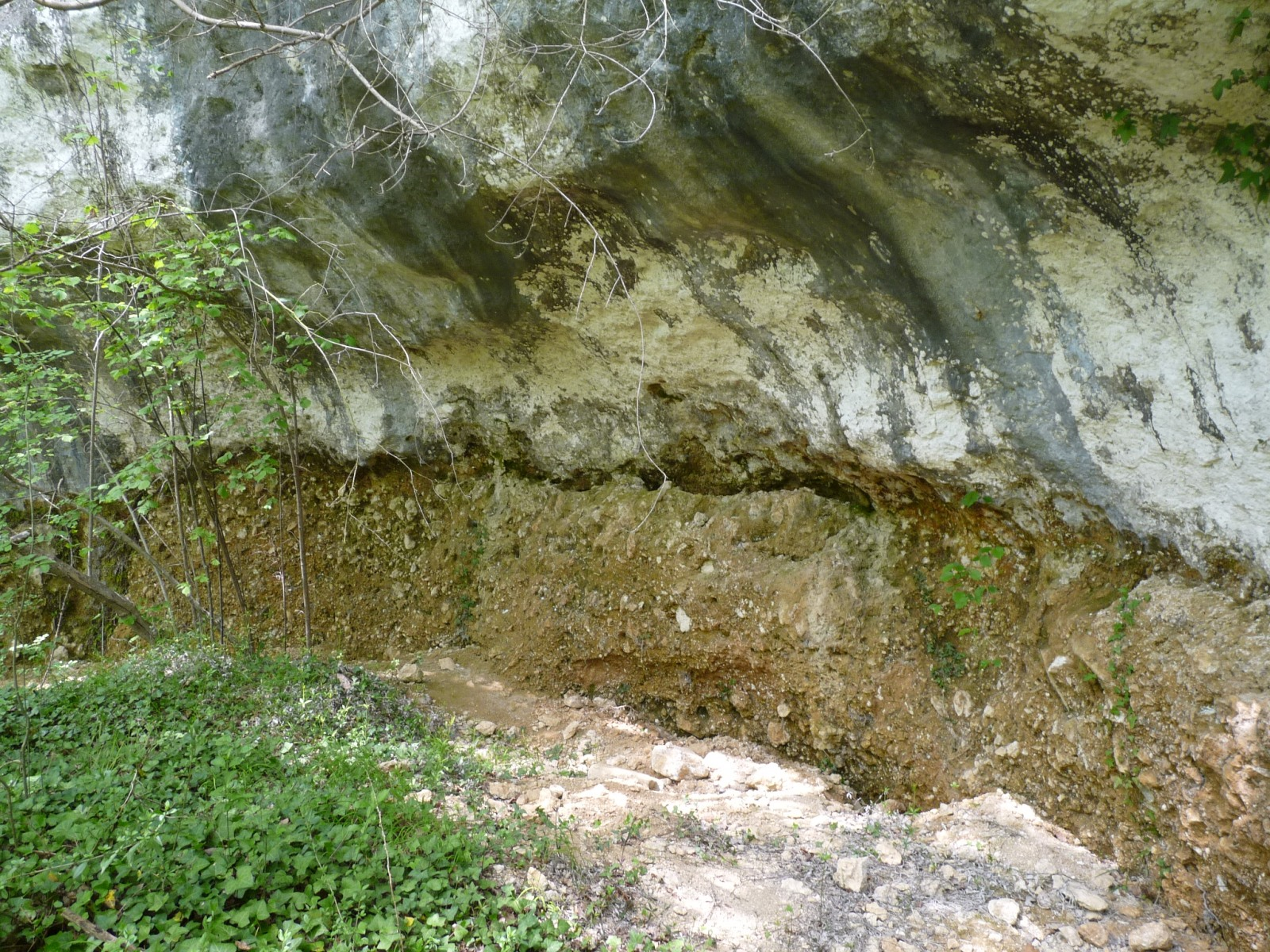 Les Vachon, Voulgézac, Charente, France. Falaise fouillée